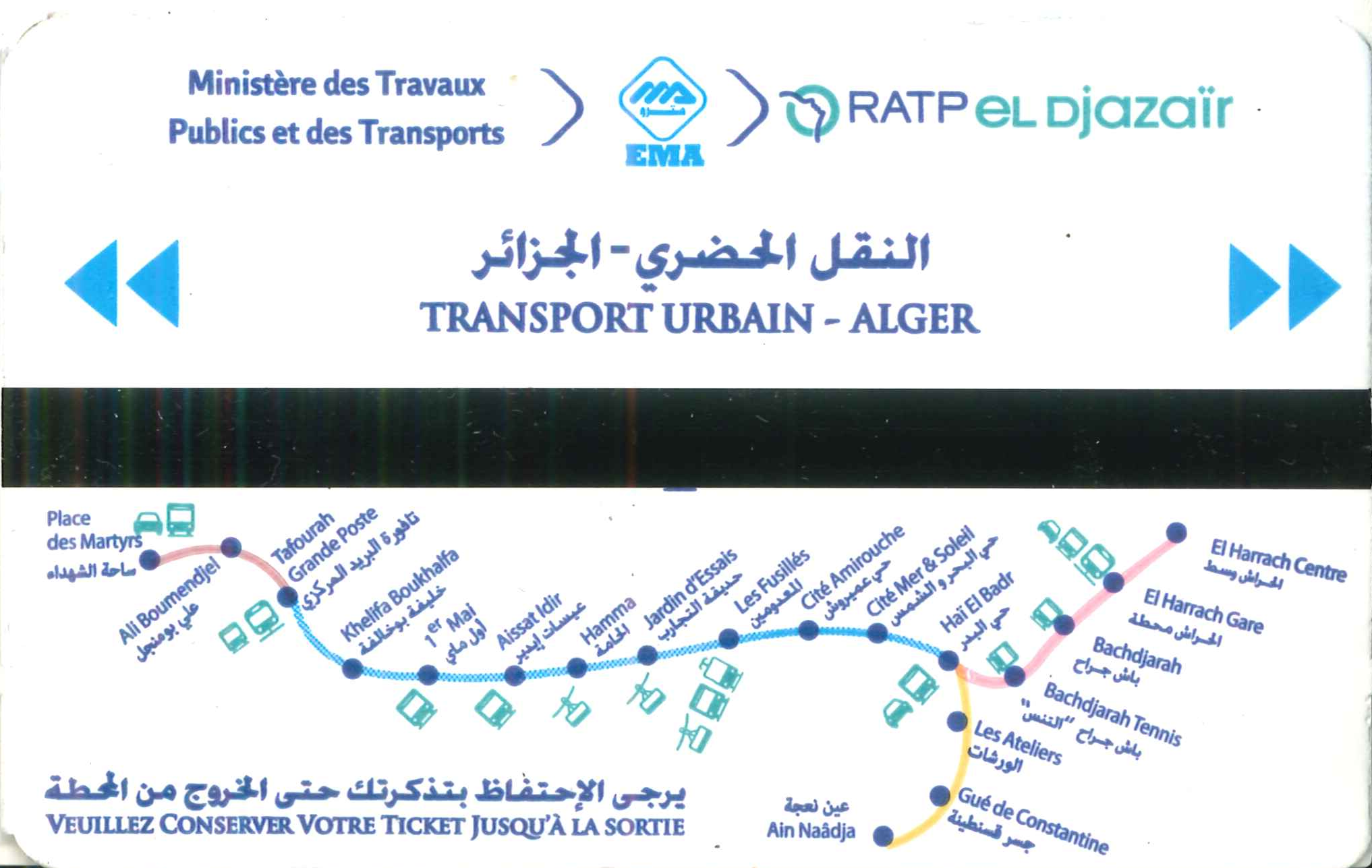 Ticket du Métro d'Alger datant de décembre 2018.